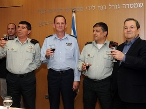 טקס מינוי יונחן לוקר לתפקיד המזכיר הצבאי לרה"מ נתניהו במקום האלוף מאיר כליפי היוצא.